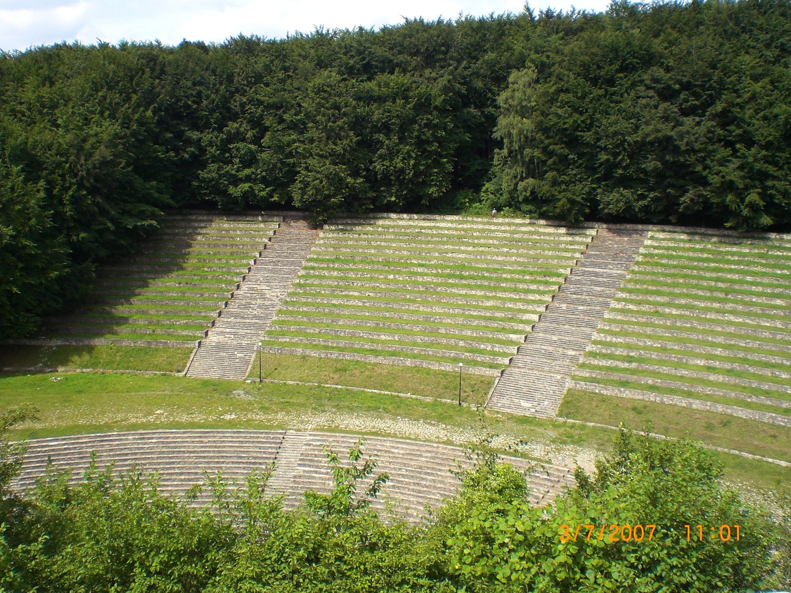 Góra Św. Anny(amfiteatr)